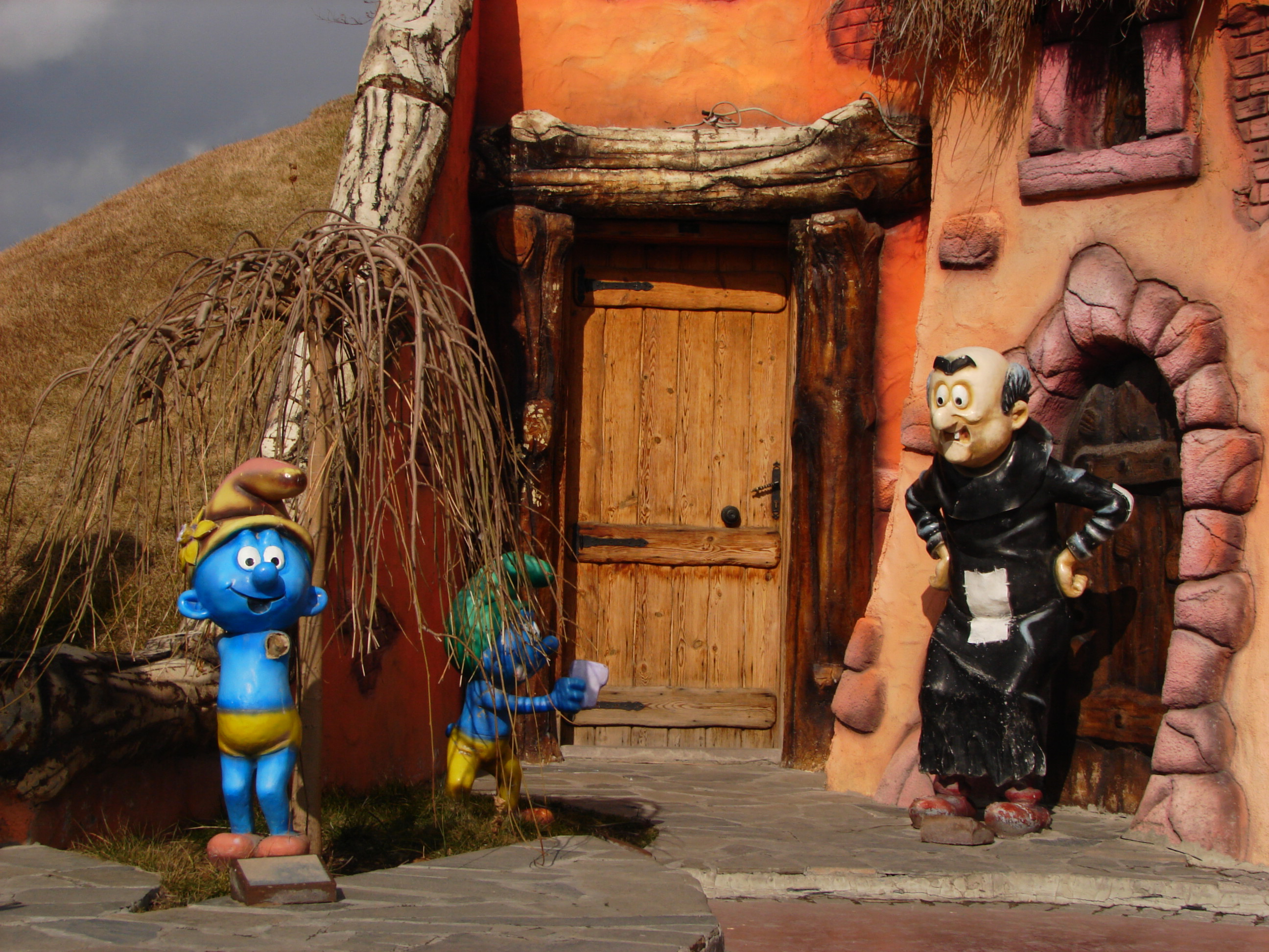 Ankara Amusement Park